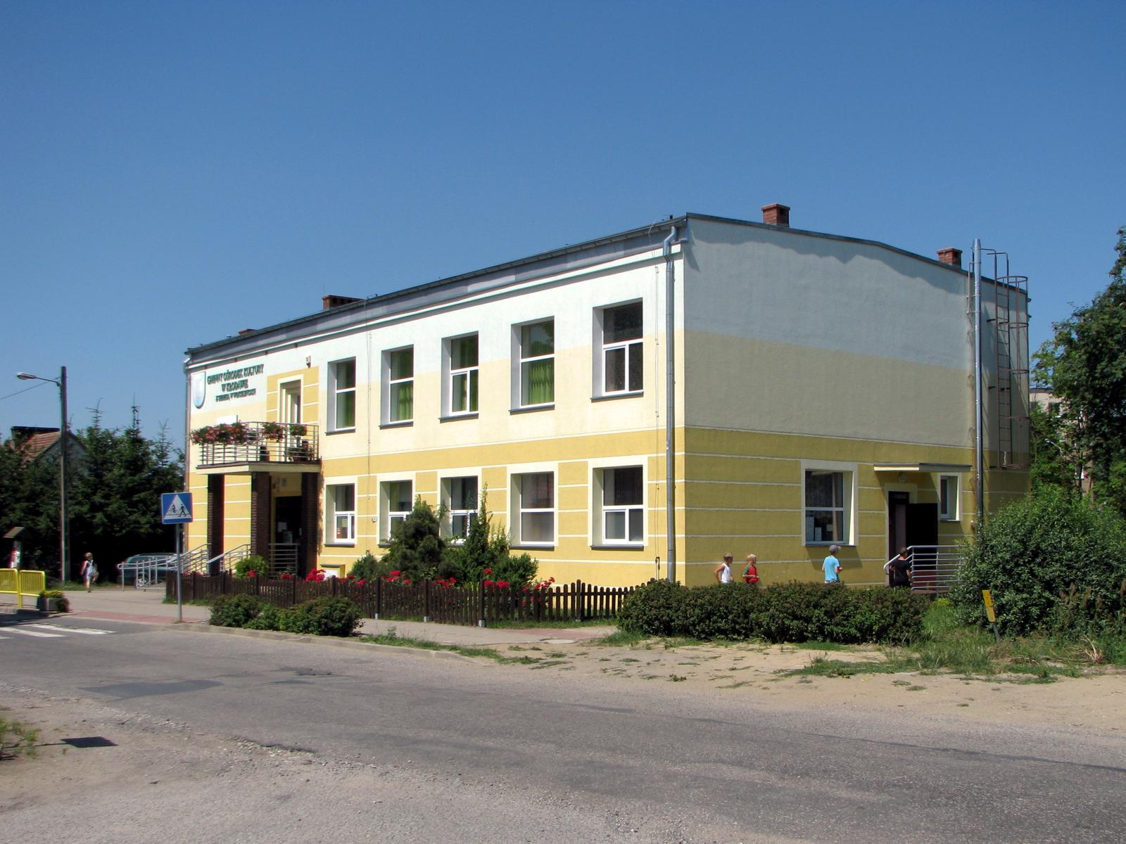 Wojcieszyce. Gminny Ośrodek Kultury